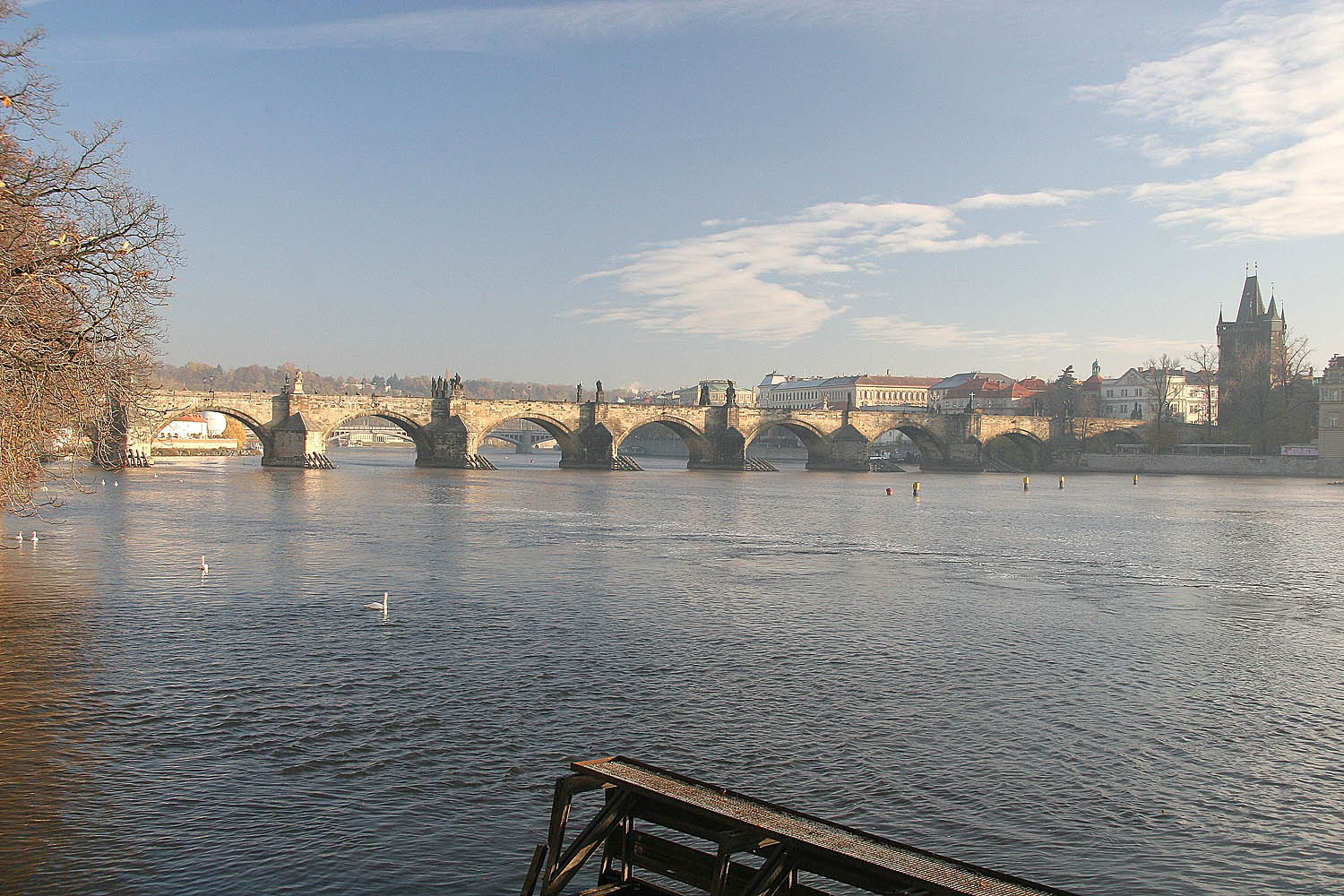 Karlův most od Sovových mlýnů